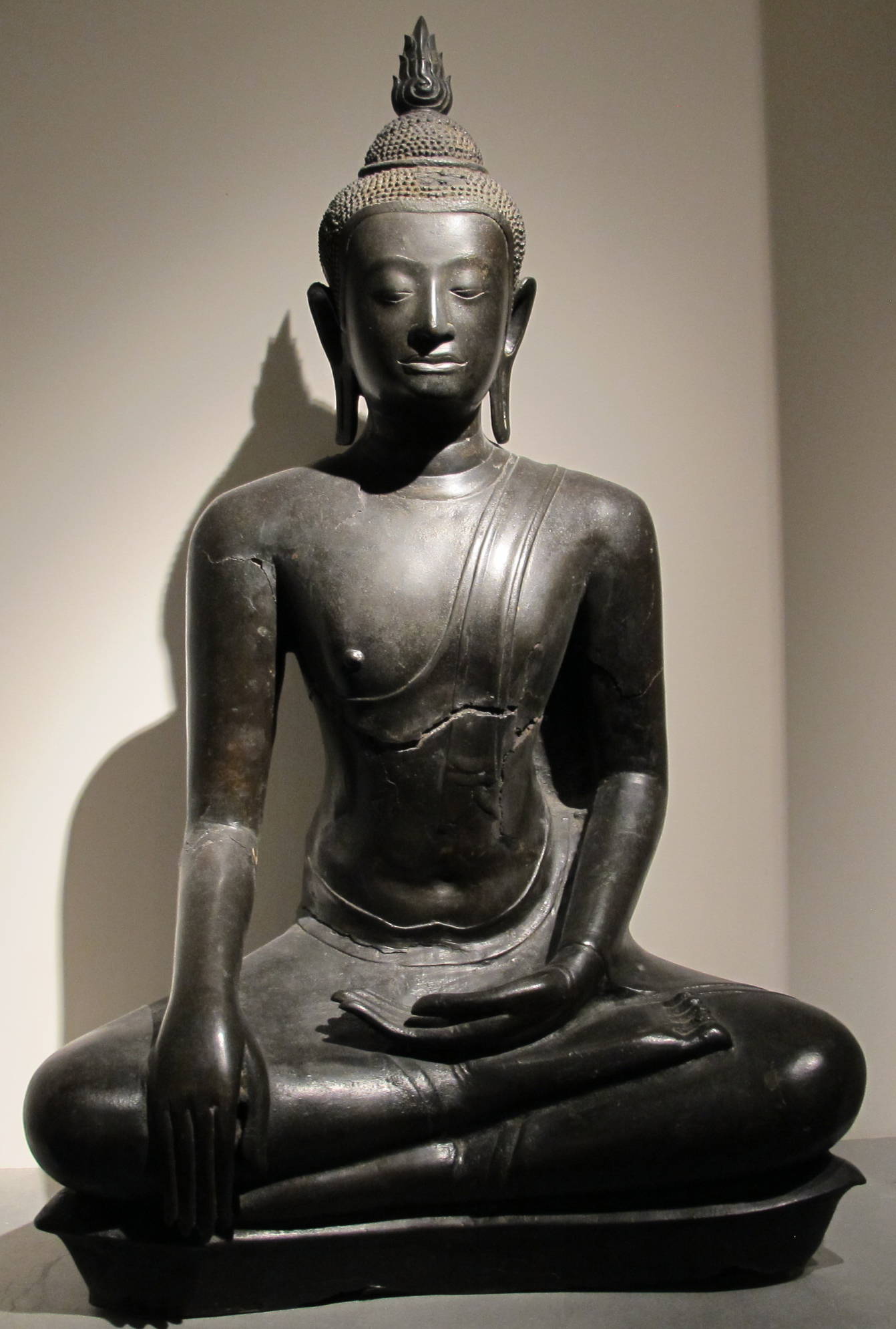 Thailandia, buddha maravijaya, prov. incerta, arte d'ayutthaya, stile B di U Thong, xiv-xv sec